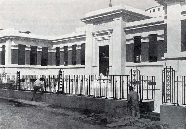 La nouvelle bibliothèque municipale de Toulouse, en 1935 (architecte Jean Montariol).